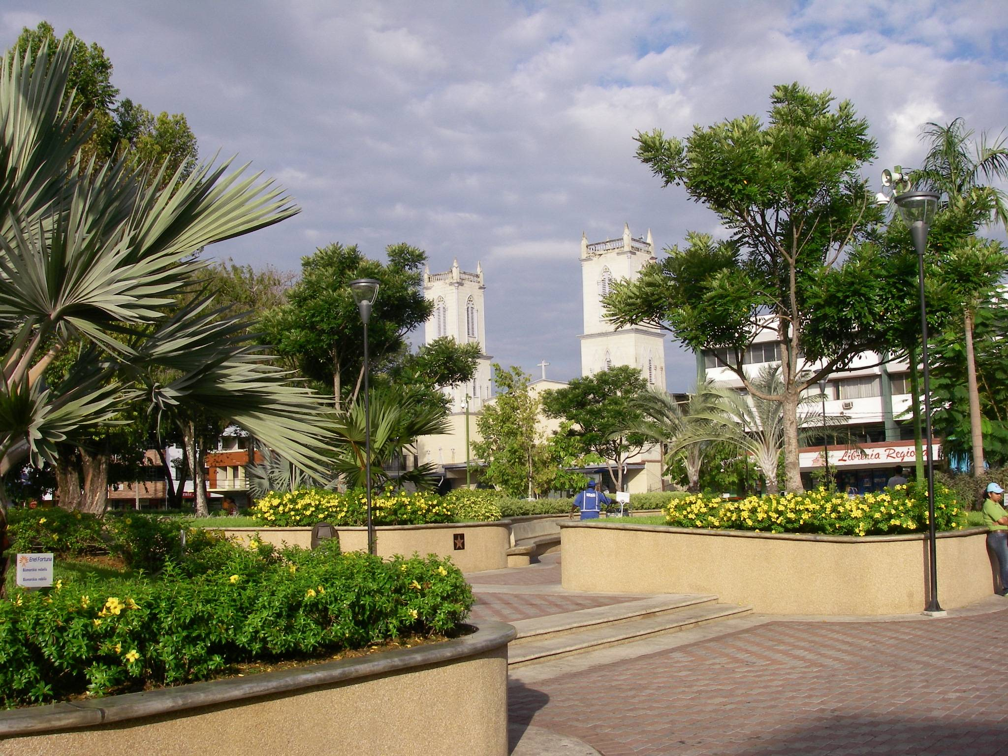 David, Panama, Hauptplatz mit Kirche